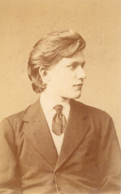 Felix Schumann (1854–1879), Sohn der Musiker Robert und Clara Schumann, im Alter von 18 Jahren. Die Aufnahme stammt aus einer Fotoserie des Londoner Fotostudios Elliott & Fry, die während des Englandaufenthalts von Felix mit seiner Mutter Clara im Jahr 1872 angefertigt wurde. Photographische Carte de Visite aus der Sammlung des Robert-Schumann-Hauses Zwickau, Original im Robert-Schumann-Haus Zwickau